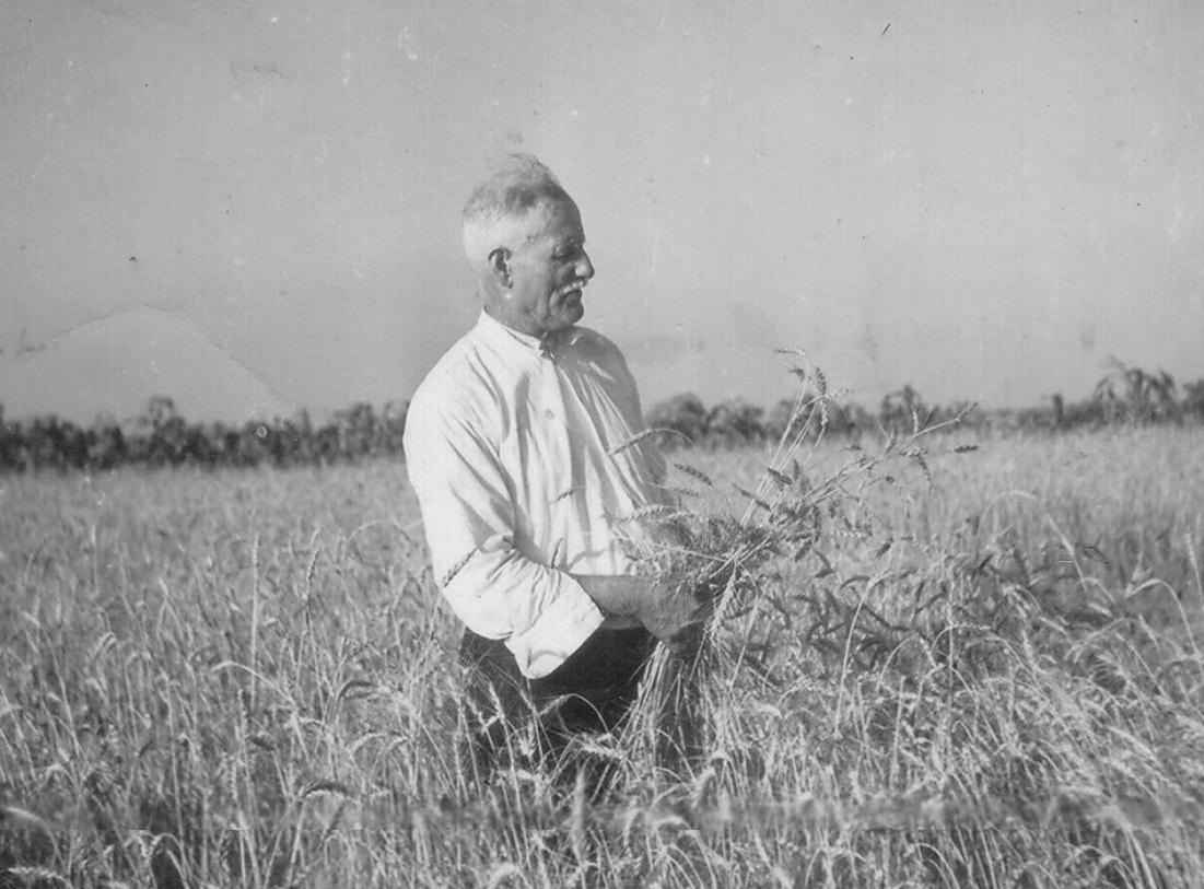 Ondrej Beňo v láne žita na sklonku života